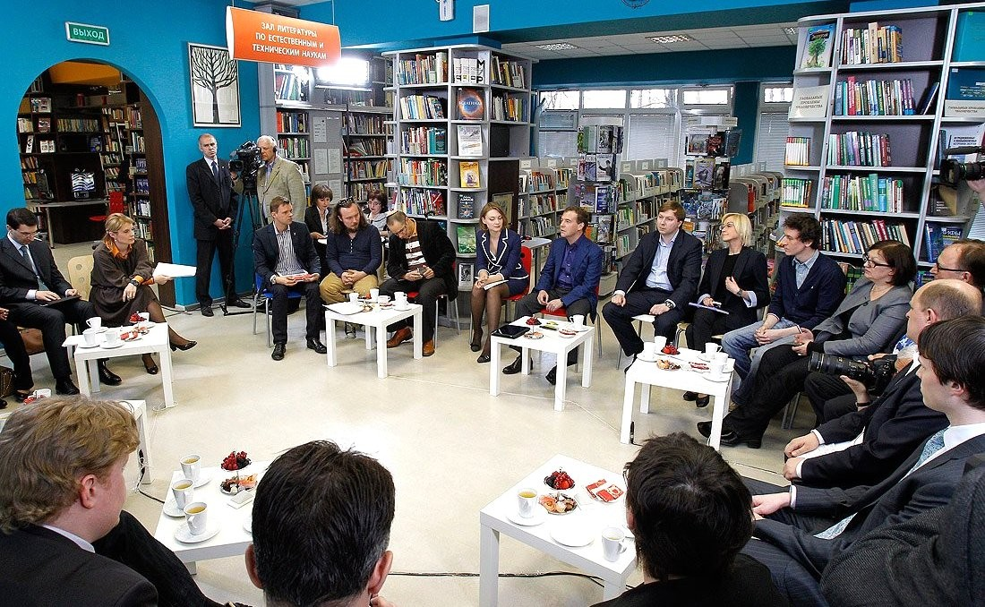 Встреча с представителями интернет-сообщества